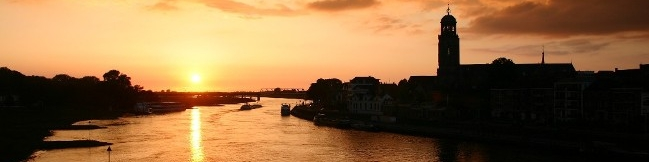 JPG O.b.v. eEigen foto: T.C. Nijeholt